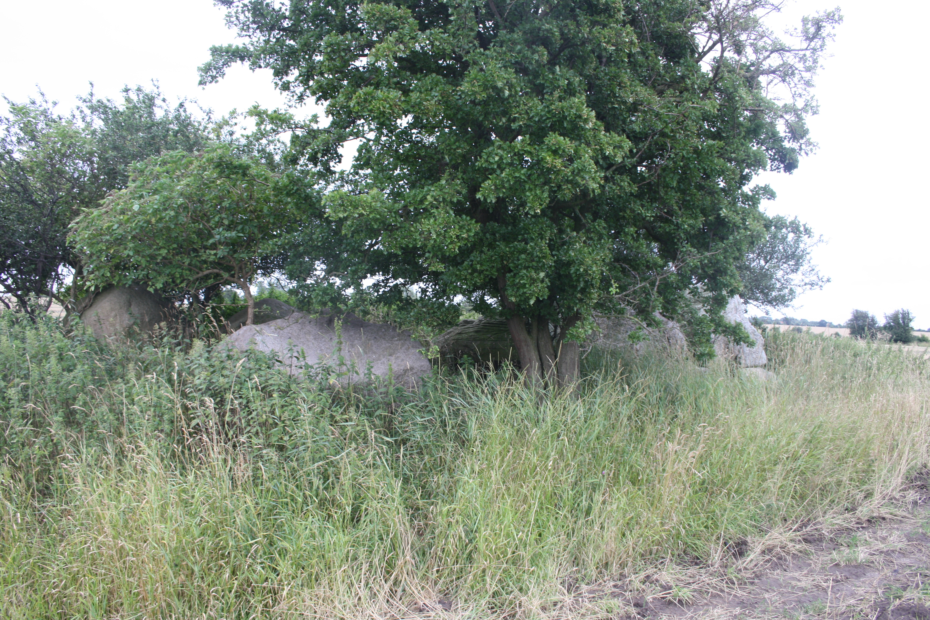 Großsteingrab Staberdorf Sprockhoff-Nummer 256